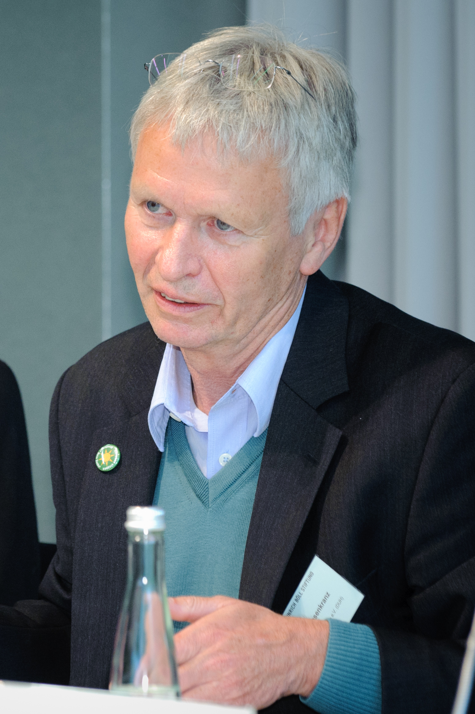 Gerd Rosenkranz, (Deutsche Umwelthilfe)